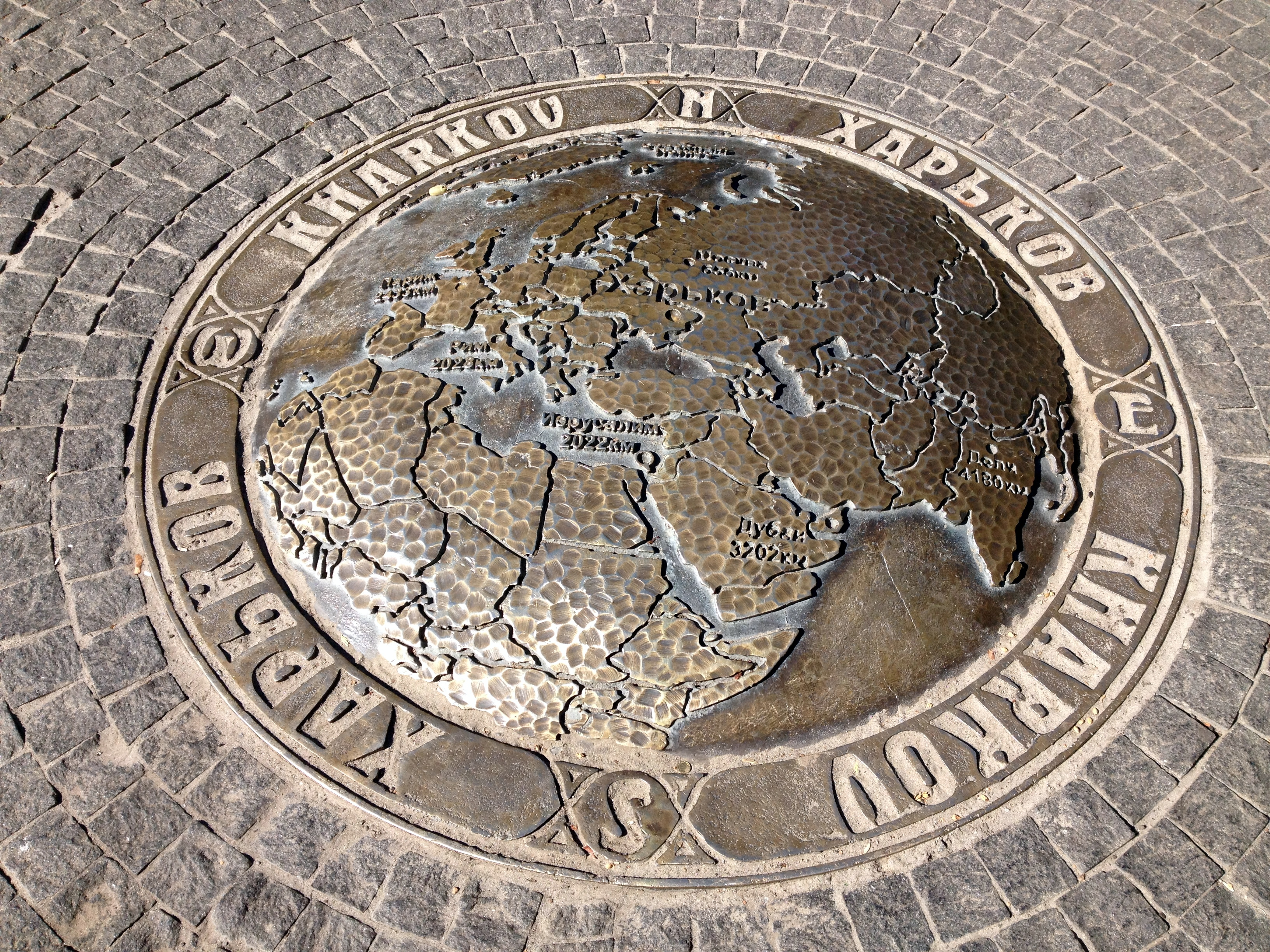 Памятник 50 параллели в Харькове